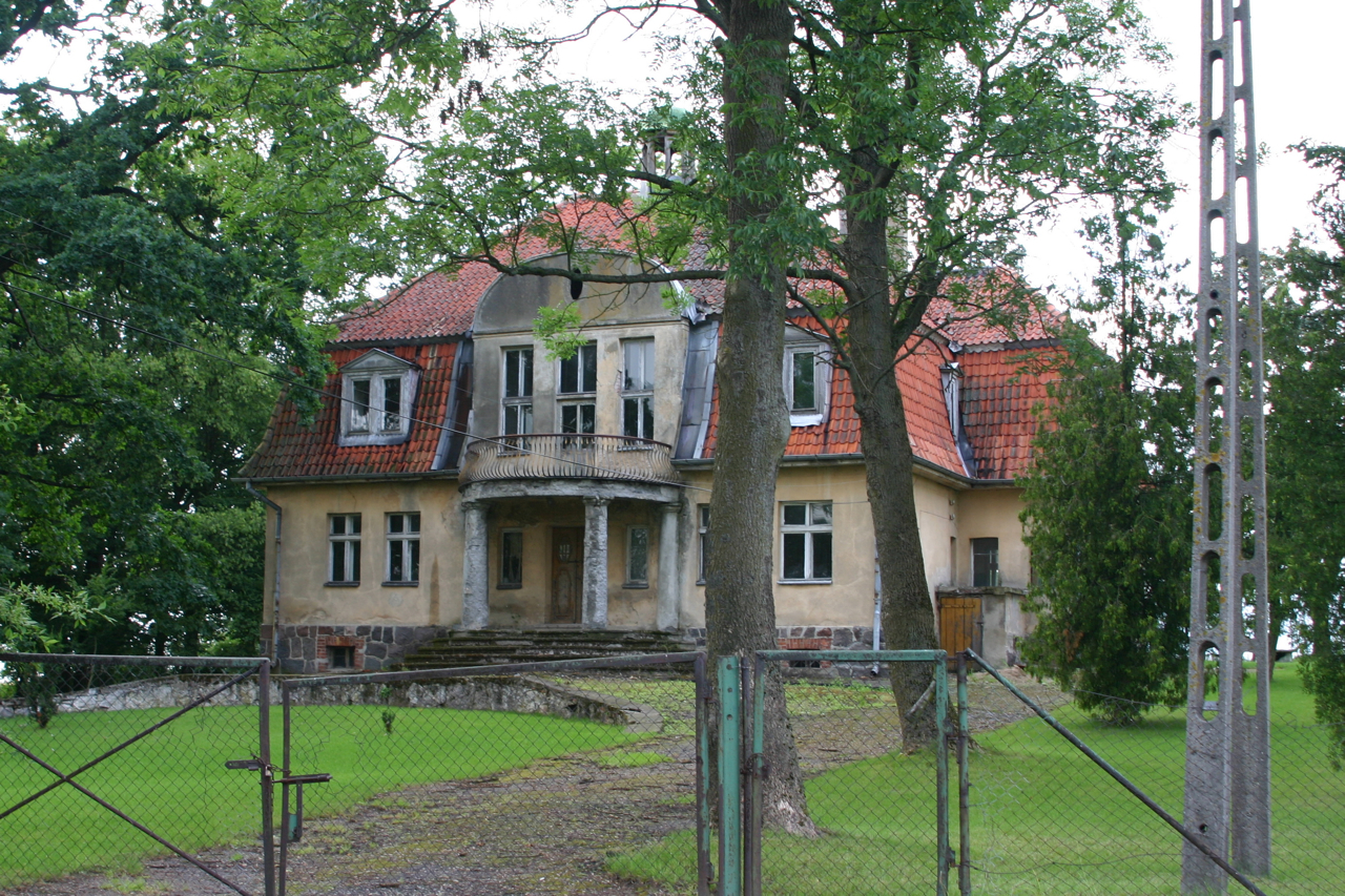 Banaszki, Polska.